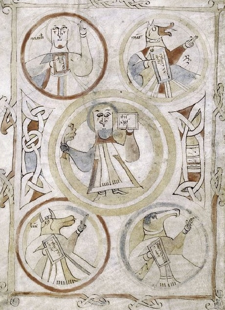 Evangéliaire de Landévennec : représentations anthropozoomorphiques de saint Marc à tête de cheval (exemplaire de la Bodleian Library d'Oxford)